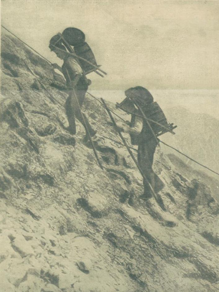 Donašanje pitne vode po strmih alpskih gorah na italijanskem boljišču.